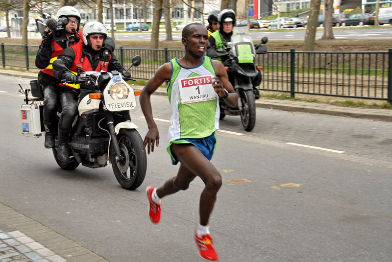 De Keniaan Samuel Wanjiru ligt ruimschoots op kop en wint uiteindelijk de halve marathon in 58 minuten en 58 seconden. Een nieuw wereldrecord. Hij was daarmee 18 seconden sneller dan zijn oude wereldrecord van 58.53, dat hij in februari van dit jaar in Dubai vestigde. Wanjiru verdiende met het nieuwe record een premie van 25.000 dollar.